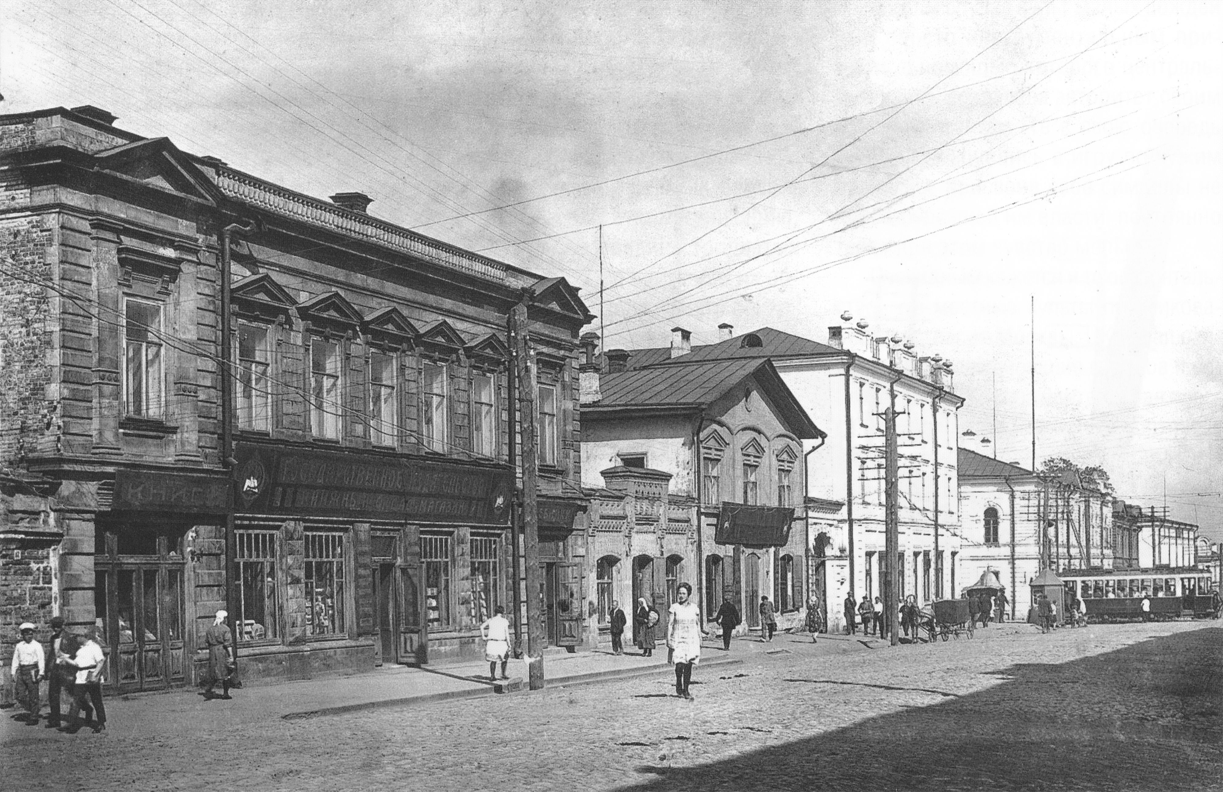 Улица Сибирская в Перми